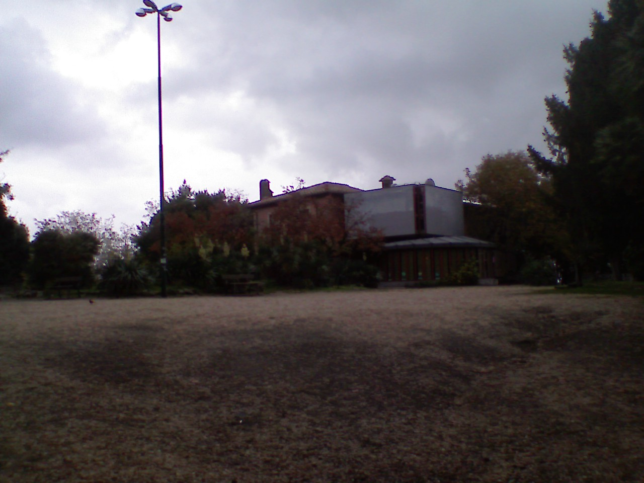 Biblioteca di Villa Desideri a Marino